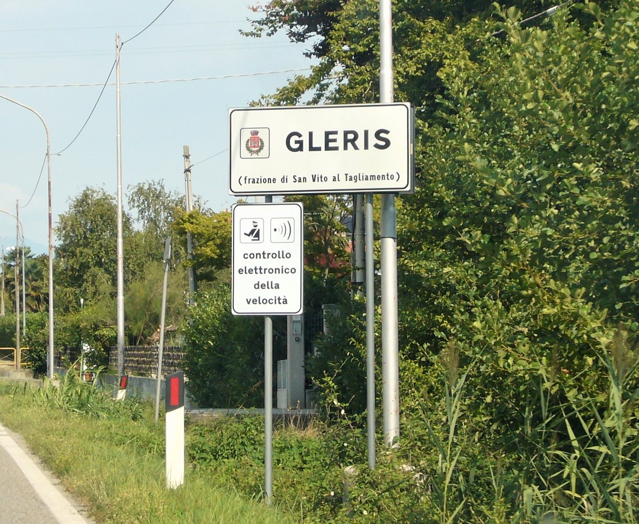 Targa posta all'ingresso dell'abitato di Gleris (PN)